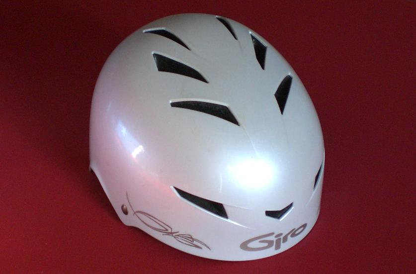 mein BMX-Fahrradhelm Giro Makai